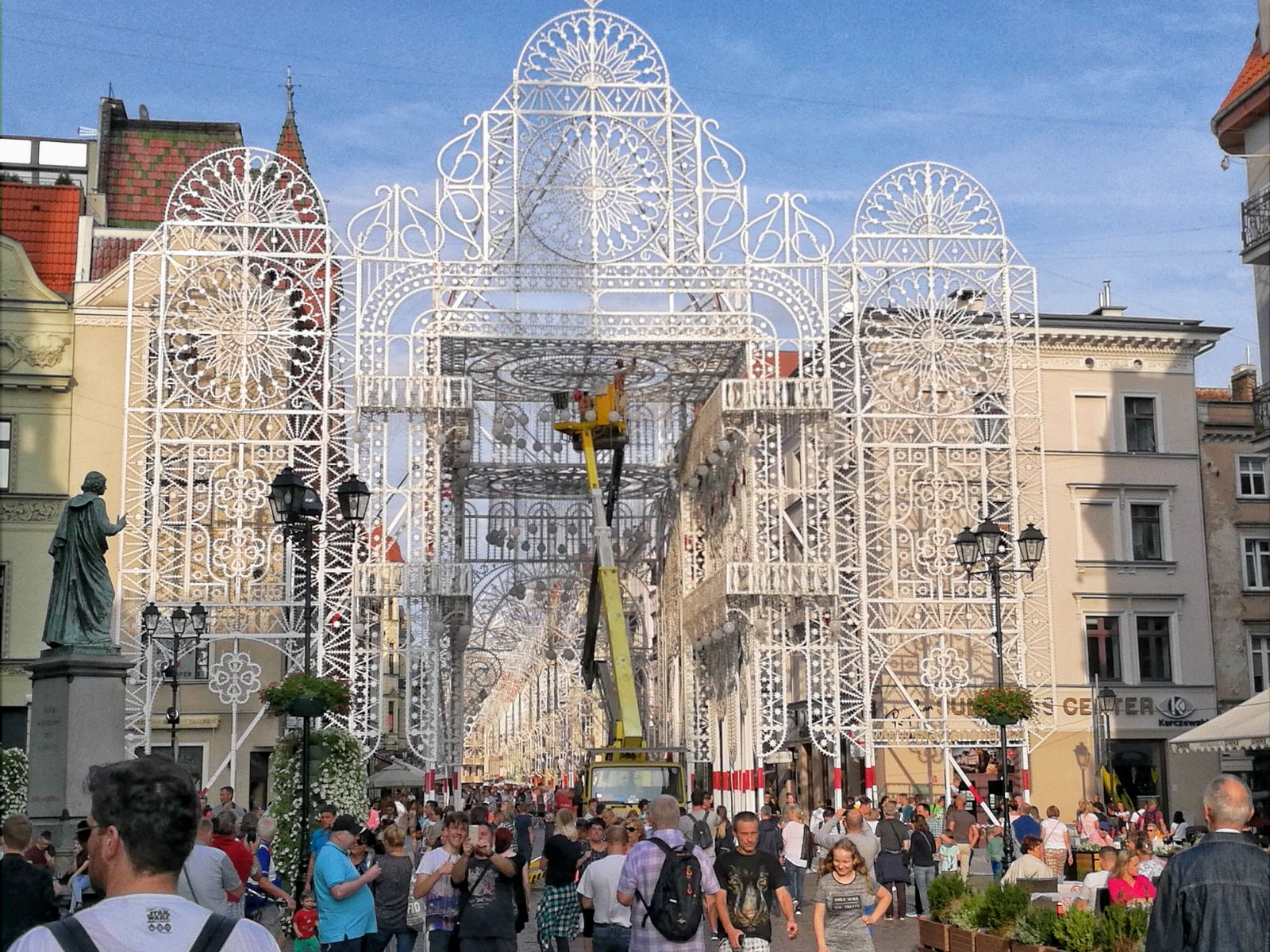 Przygotowania do projekcji "Renaissance Palace" na ulicy Szerokiej, 2017 rok